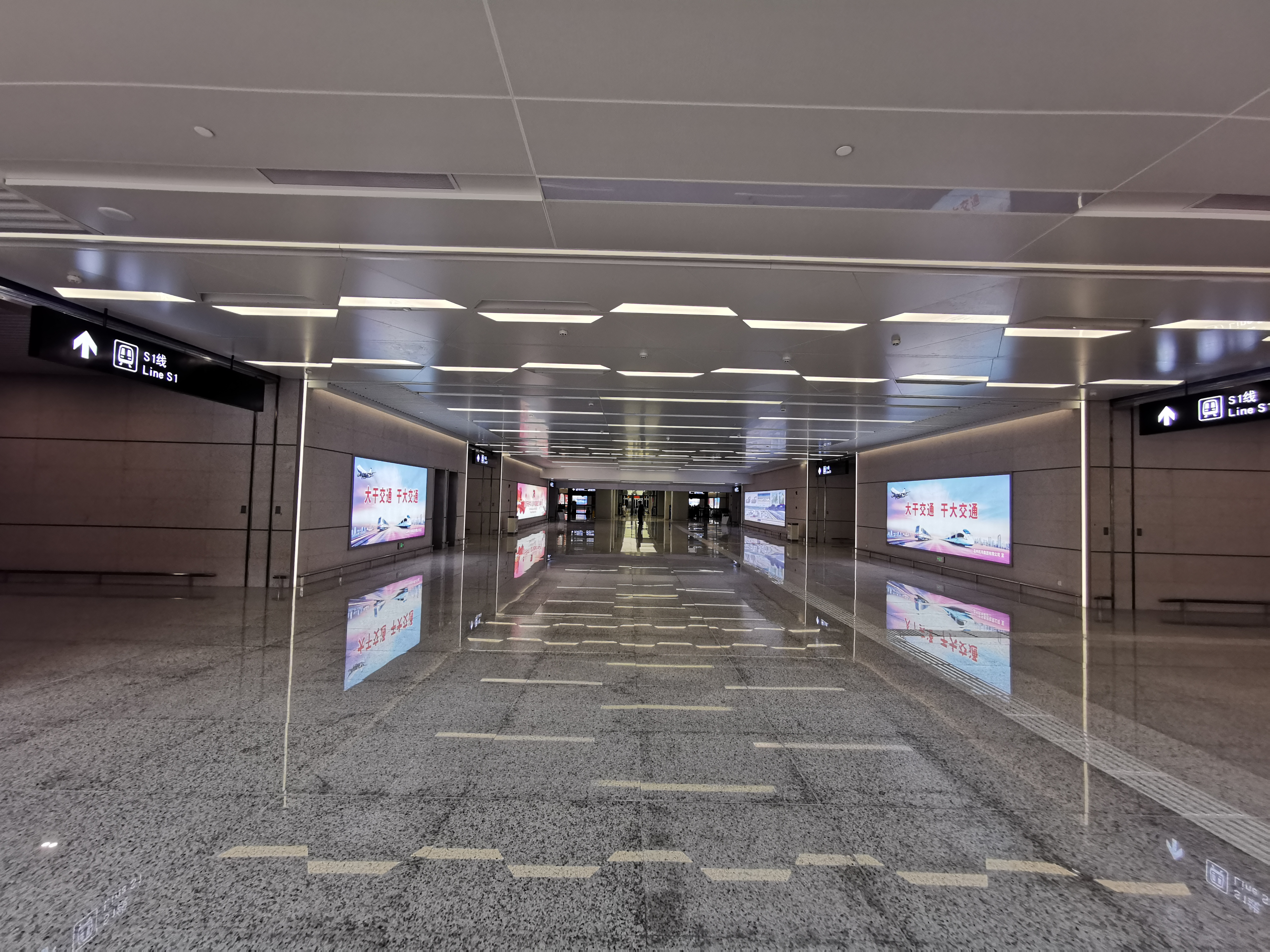 中文（中国大陆）: 温州轨道交通S1线，机场车站；联通龙湾机场二号航站楼的通道